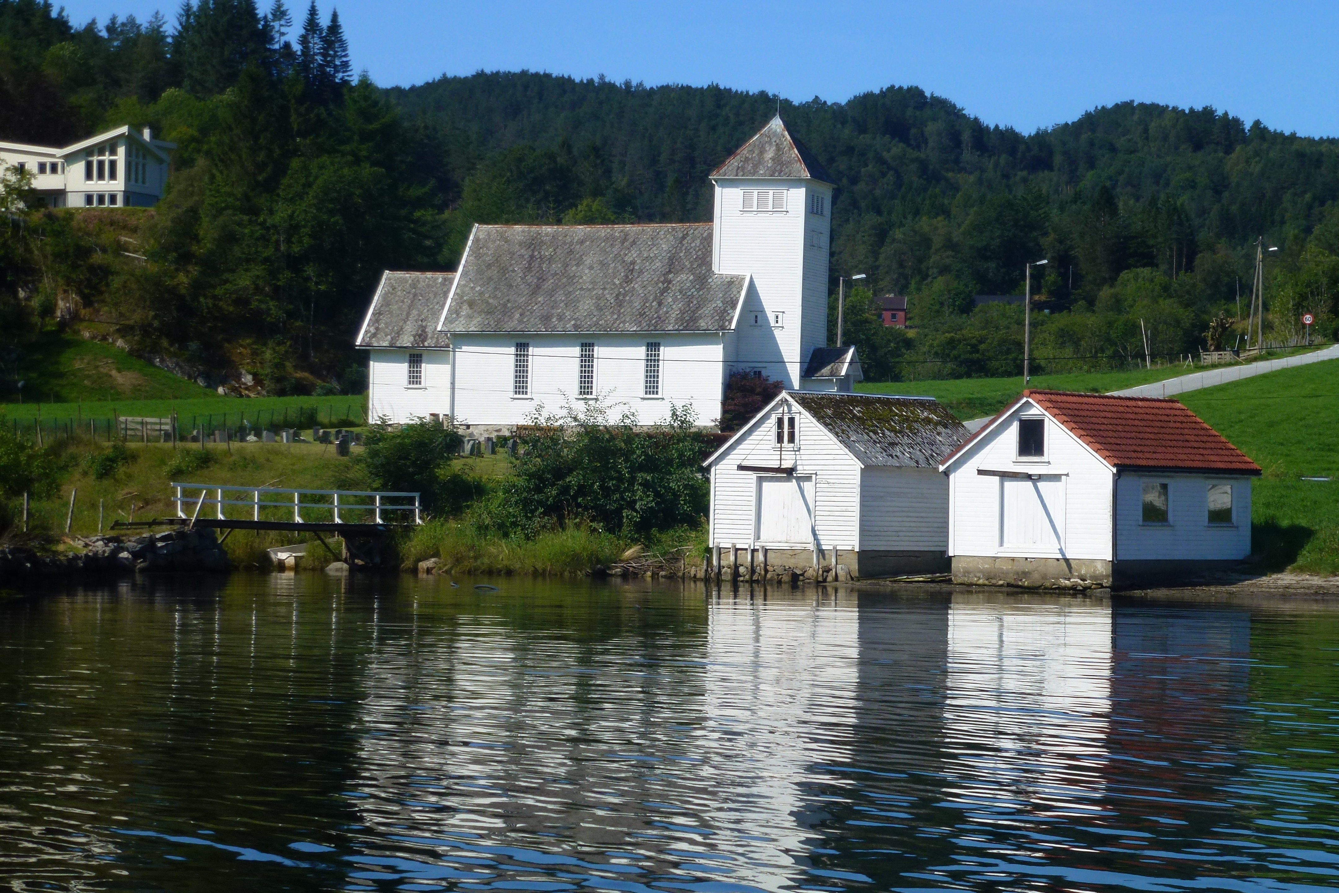 Suldal, Norway